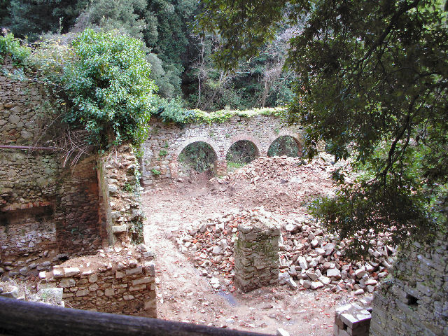 eremo di malavalle, il convento, ruderi